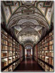 Biblioteca Comunale Mozzi Borgetti Immagine di proprietà della Biblioteca autorizzazione accordata per il testo della voce medesima OTRS tkt #2007020710008963